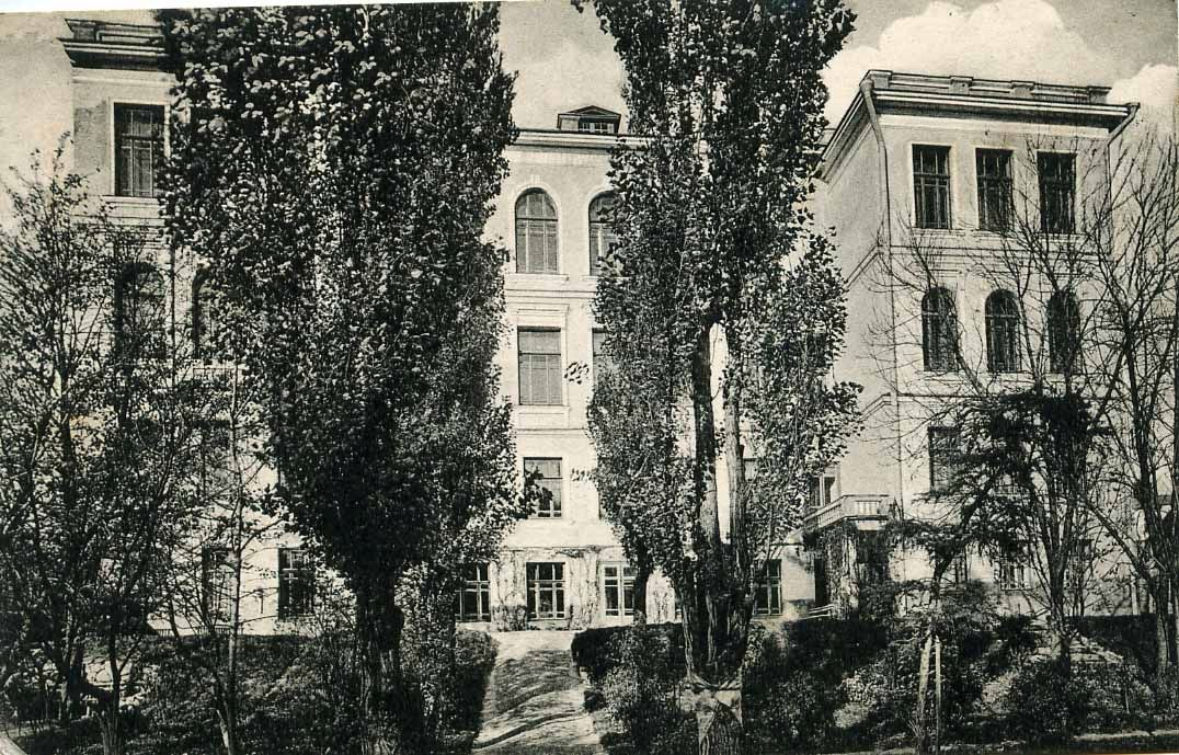 Москва. Частная гимназия Е.Е. Констант